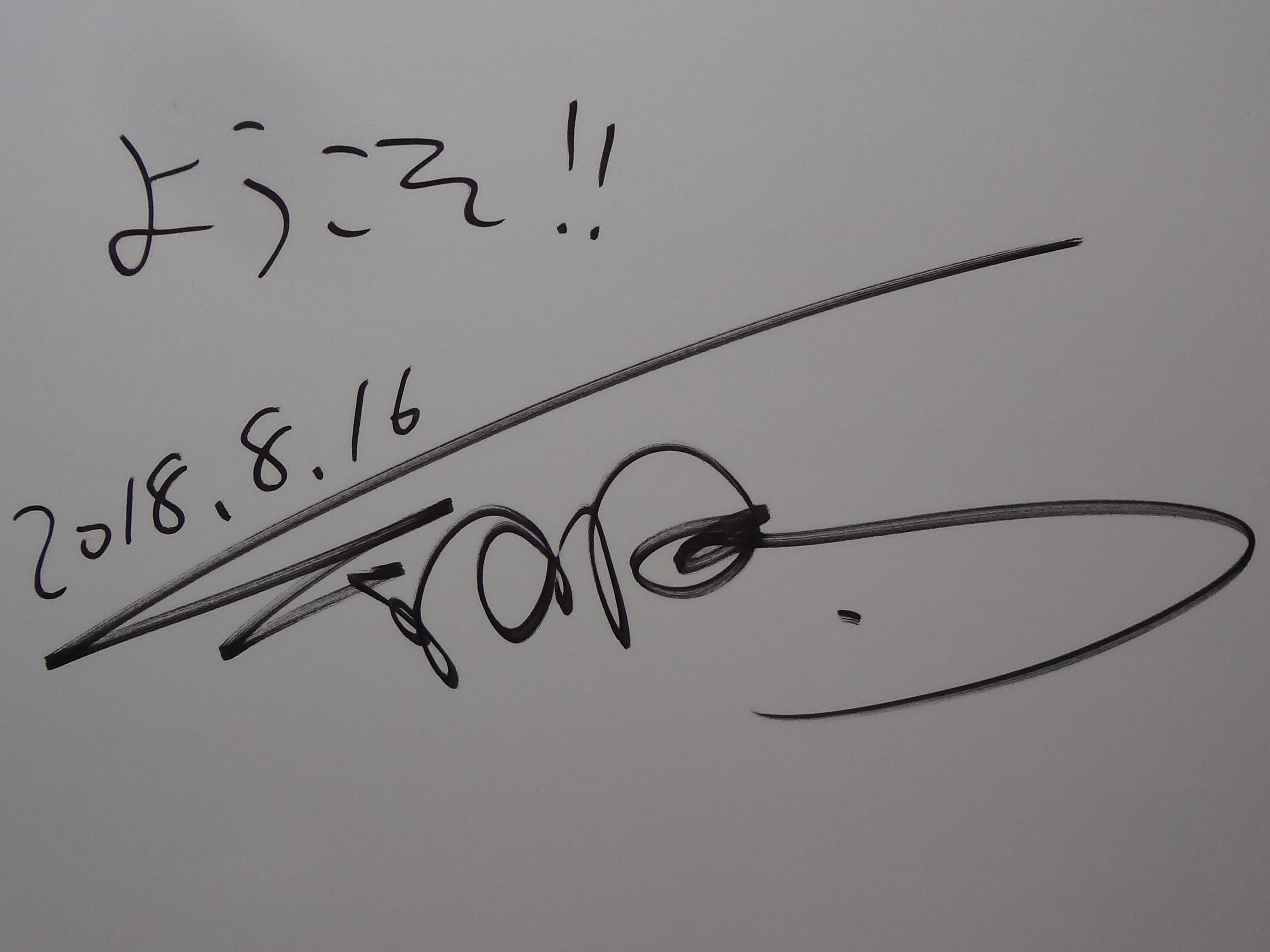 2018年（第19屆）漫畫博覽會日本館，2018年8月16日細田守的簽名。